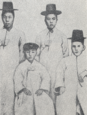 조선 최초의 유아세례자의 일부, 윗줄은 좌로부터 서병호, 김규식, 앉은 이는 김일, 원한경 순